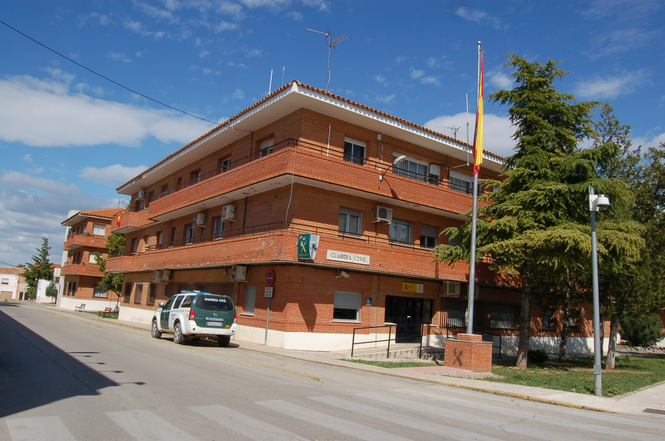 Casa cuartel garda civil Tarancón